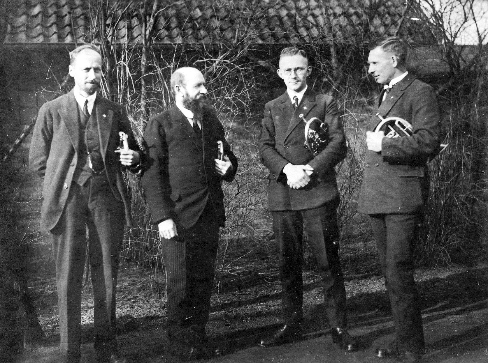 Posaunenfreizeit in Hannover 1930. Abgebildet sind von links nach rechts: Ernst Voß, Karl Pätz, Karl Rieck, Karl Schwedhelm.